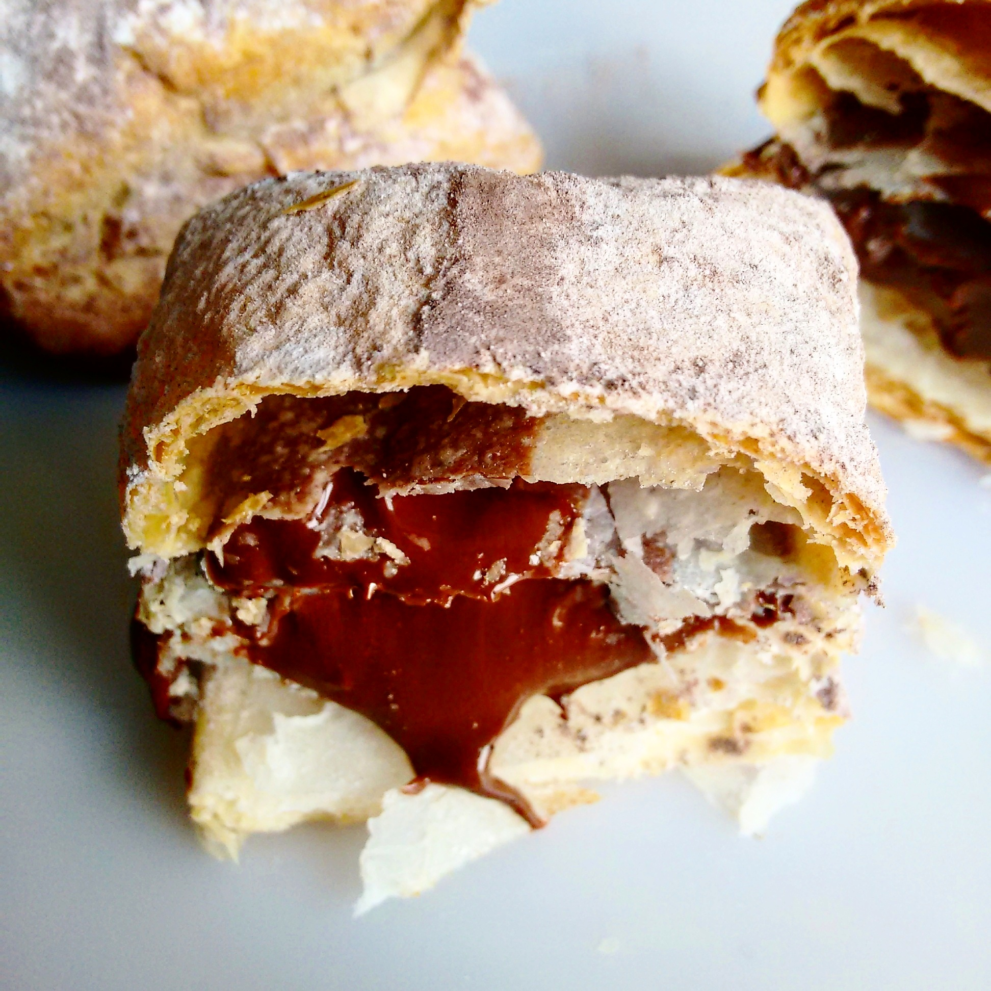 Disfruta del contraste de texturas de estos dulces elaborados con un fino hojaldre relleno con una crema delicada de chocolate. Cubiertos con azúcar glass y cacao y con su toque de pasta de avellana, estos dulces mordiscos te harán repetir y repetir. Los Miguelitos de chocolate no necesitan refrigeración, y deben mantenerse en lugar fresco y seco aislado de fuentes de calor.